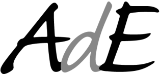 Emblem of the Academy of Esperanto. (Emblemo de la Akademio de Esperanto)